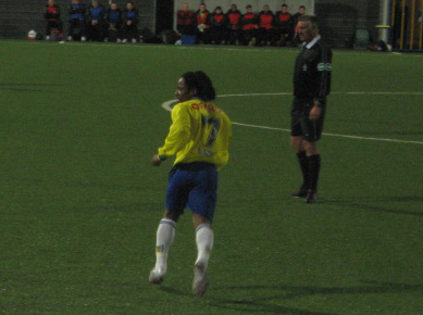 Marc Mboua, professional soccerplayer.